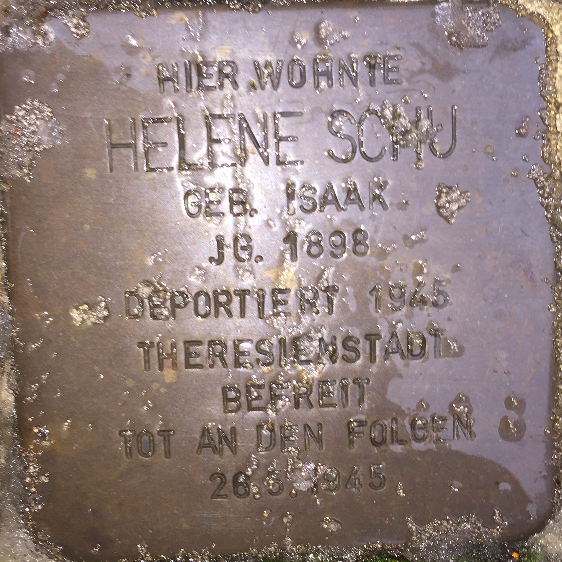 Der Stolperstein von Helene Schu im Matzenecken